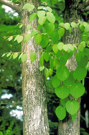 Katsura tree